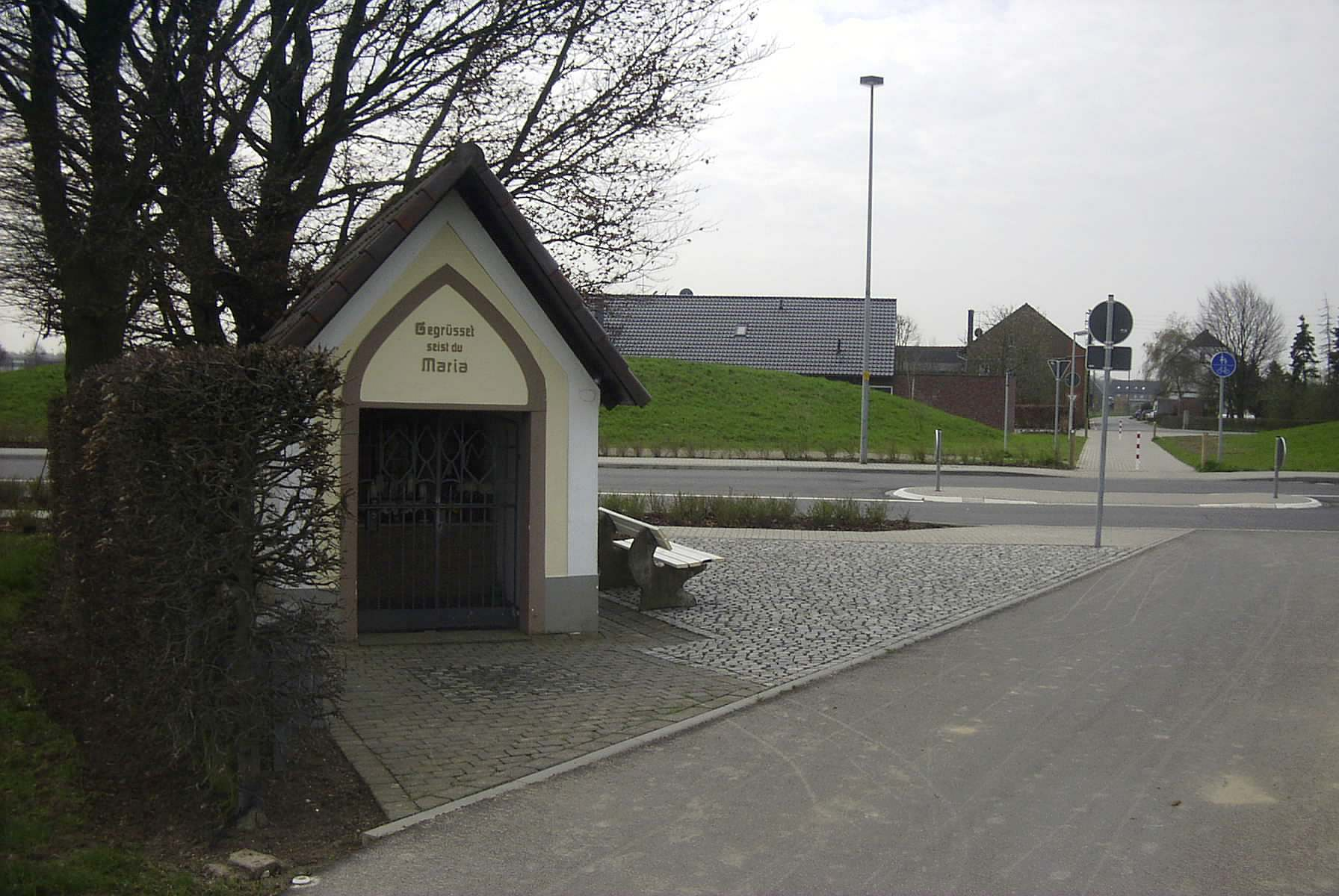 Bildbeschreibung: Marien-Kapellchen, Fahrradweg und Commerden hinter dem Deich, Erkelenz